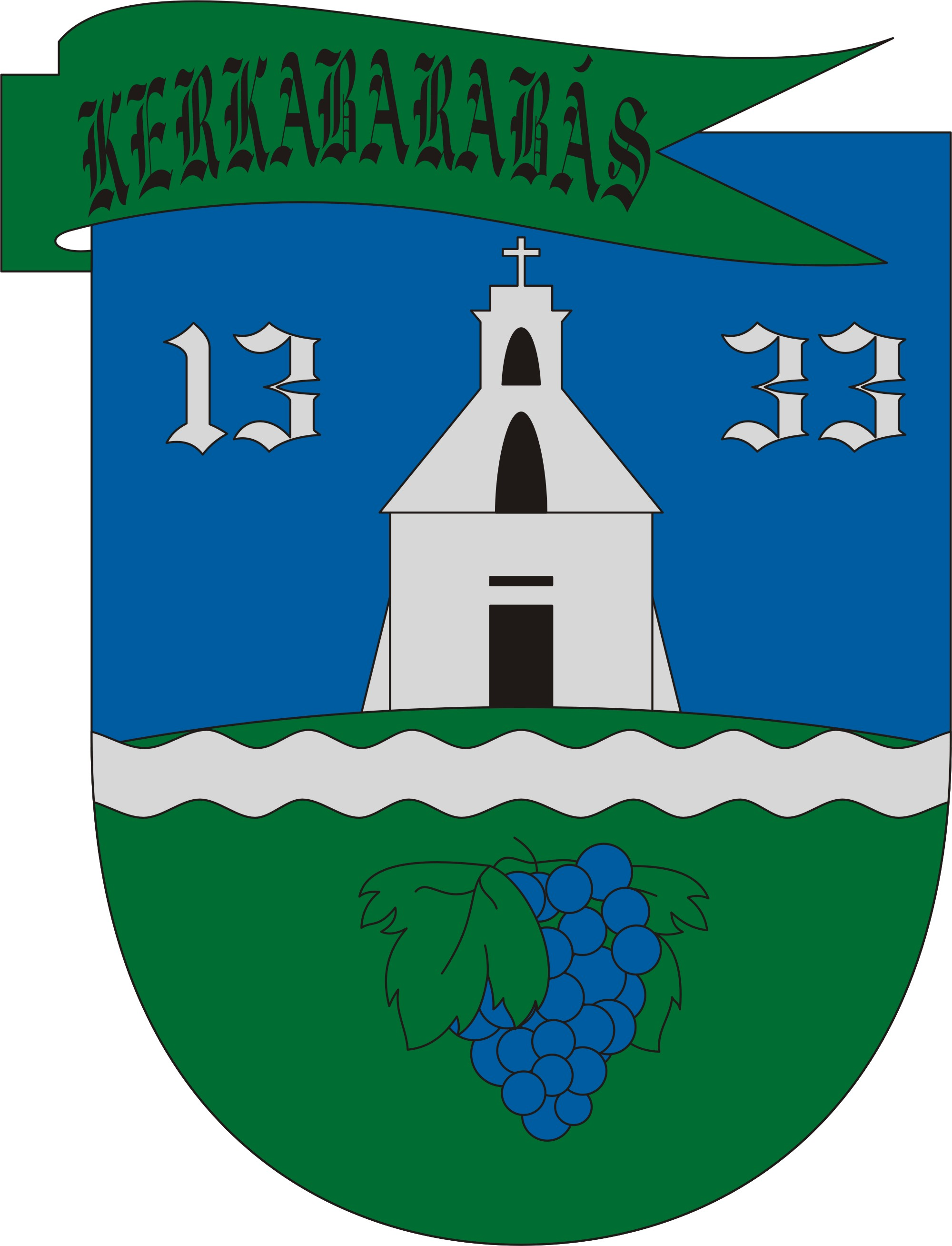 Blason de Kerkabarabas